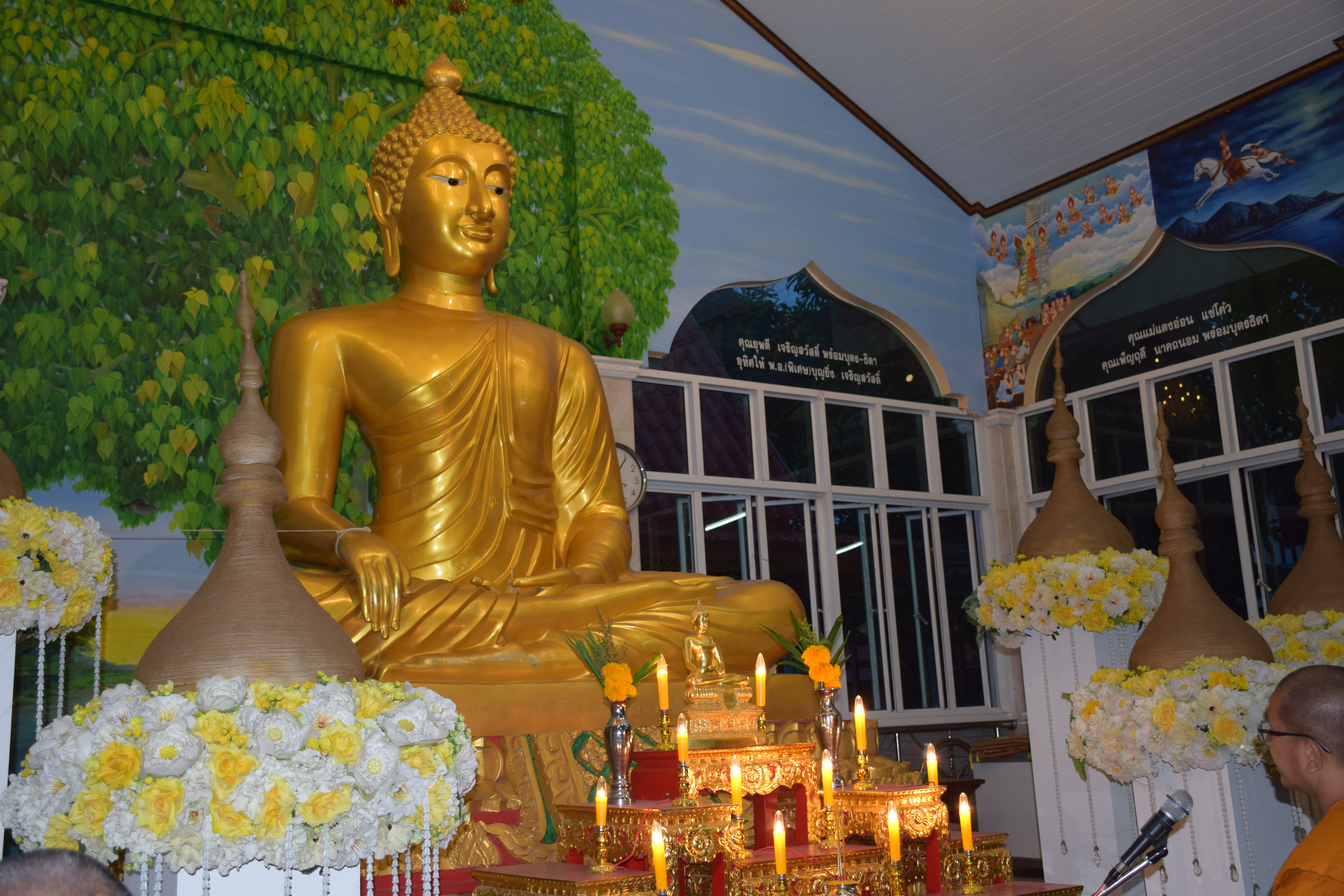 พระพุทธเมตตรามหาสิทธิโชค(หลวงพ่อเมตตราศักดิ์สิทธิ์)